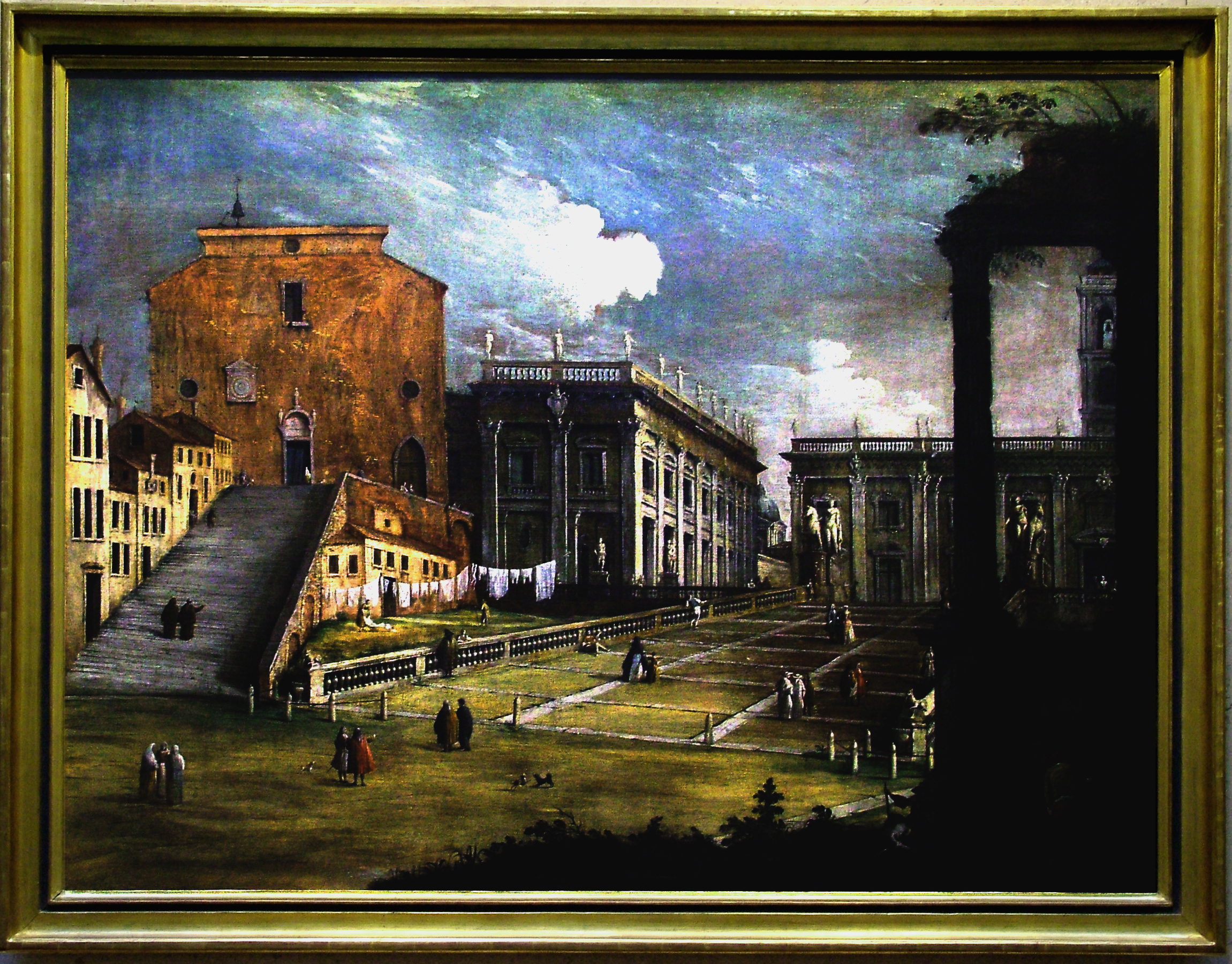 Canaletto: Városkép (Szépművészeti Múzeum, Budapest)